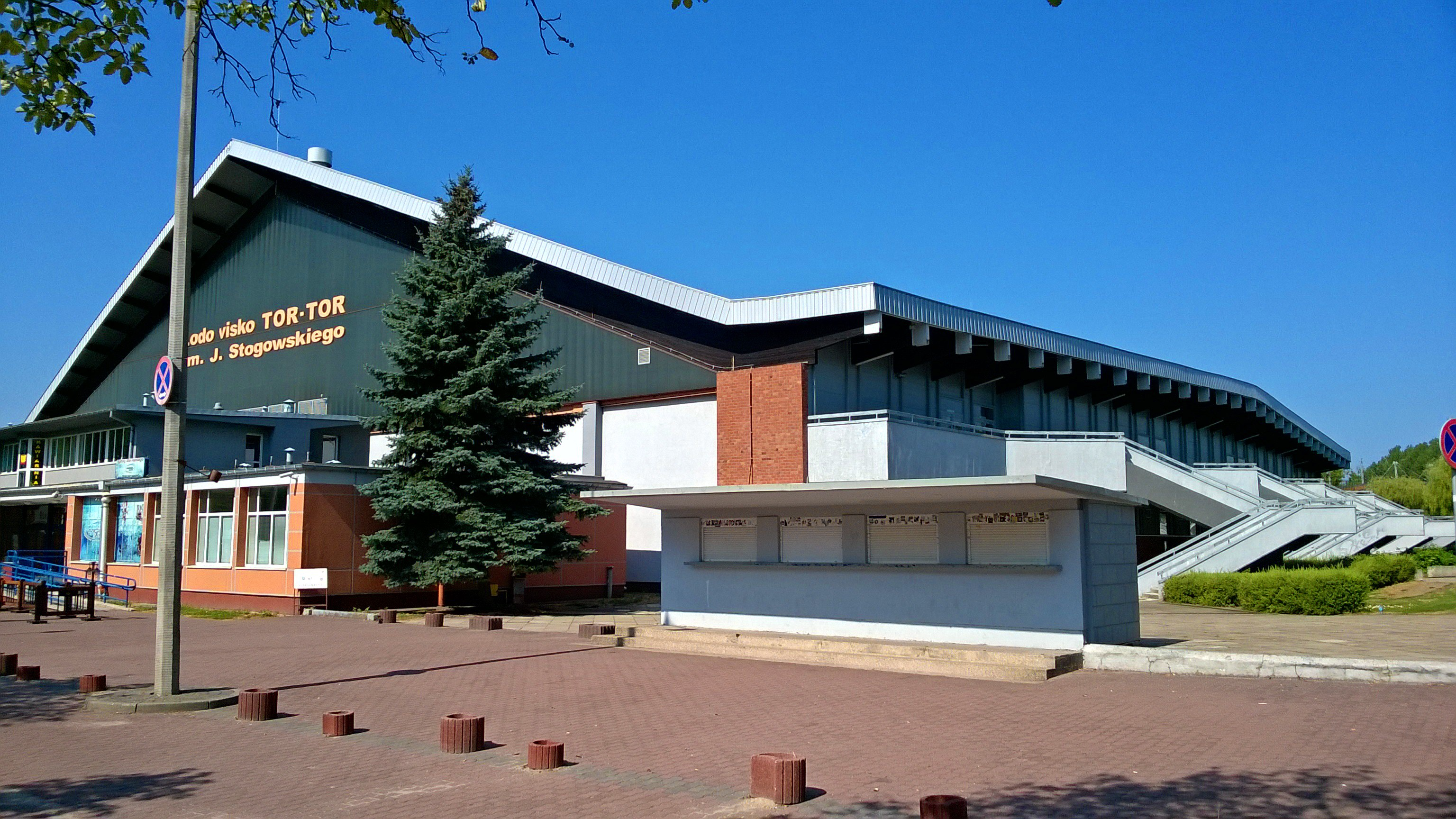 Lodowisko w Toruniu56